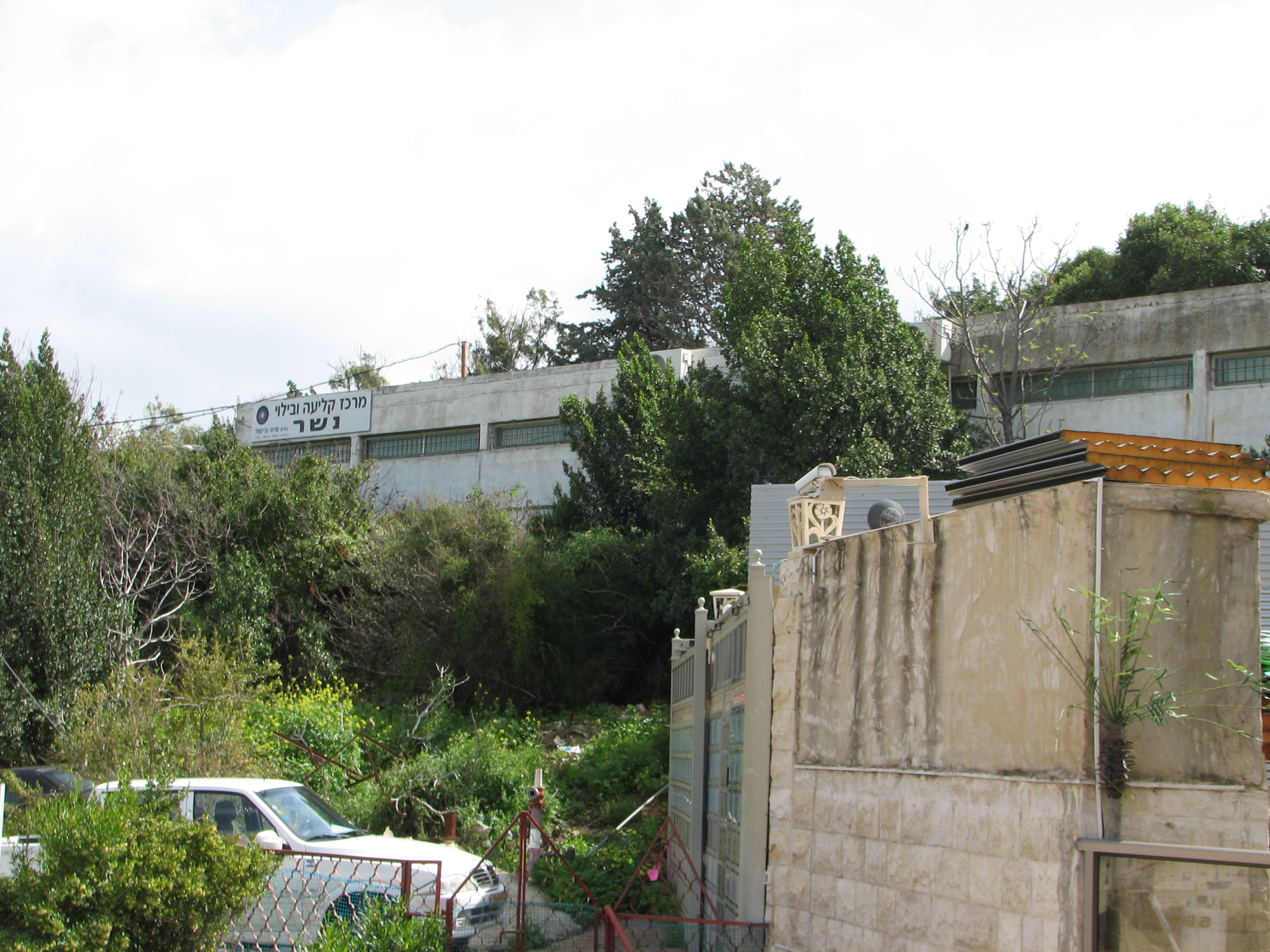 Nesher The City Nesher on Mount Carmel and Suburb:Givat Nesher תמונות משכונותיה של העיר נשר, גבעת נשר, בית ספר היסודי גנות לשעבר בגבת נשר